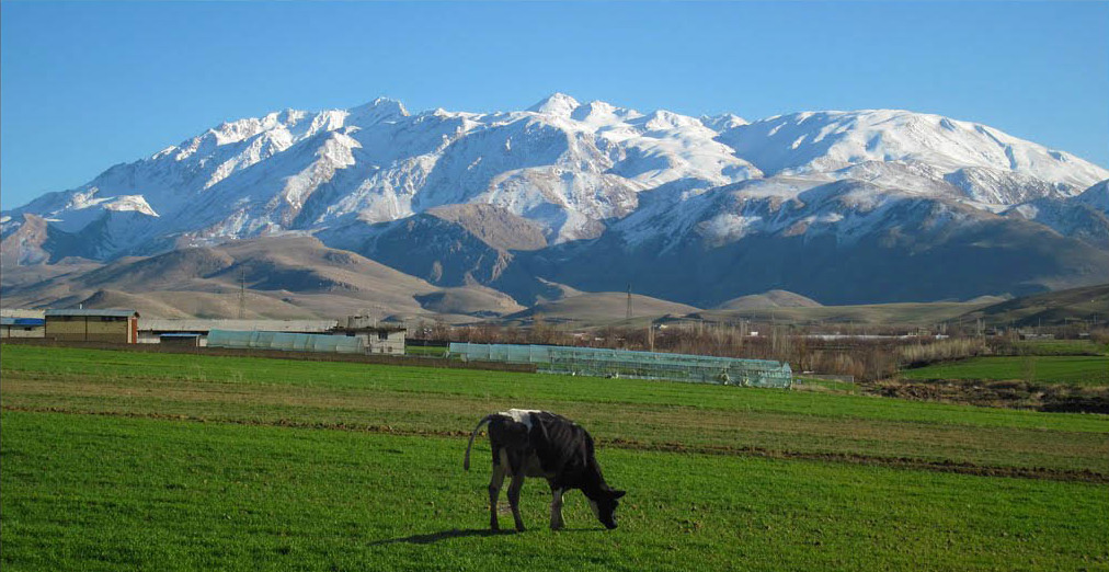 دشتی در مجاورت اشترانکوه در استان لرستان.